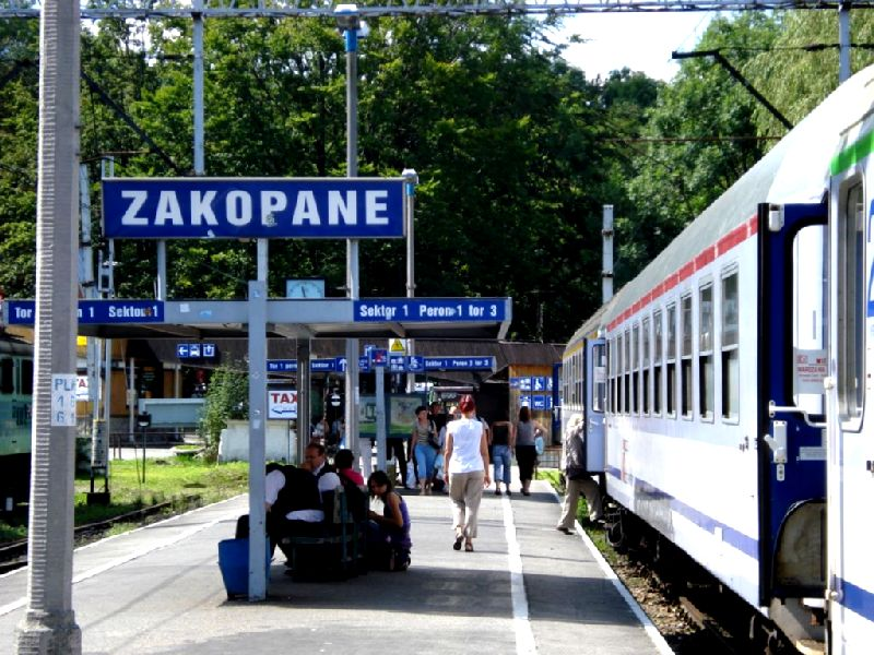 Zakopane (stacja kolejowa)